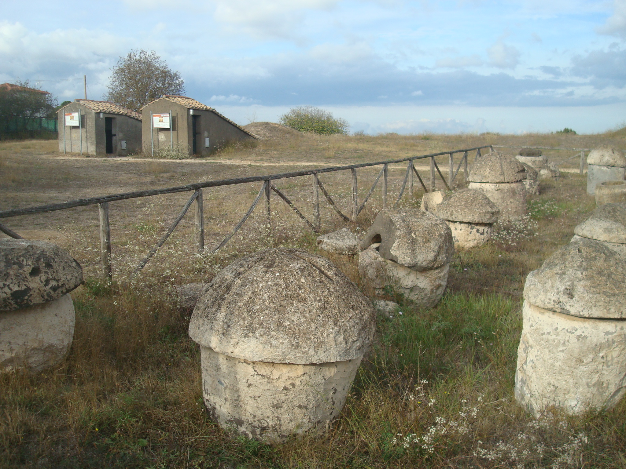 La Necropoli Etrusca - Museo archeologico nazionale tarquiniense - MIBAC . This is a photo of a monument which is part of cultural heritage of Italy.